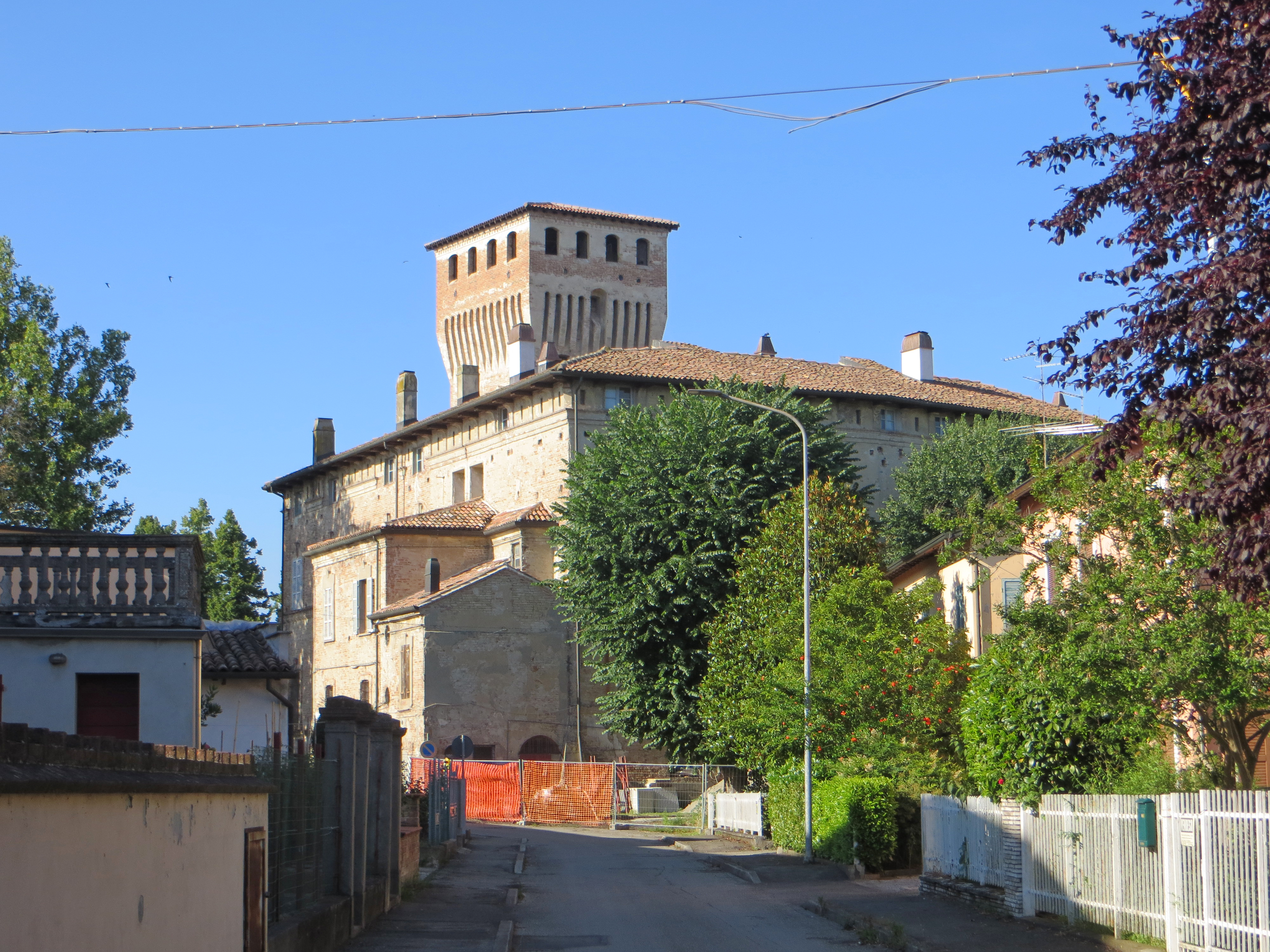 Rocca dei Terzi (Sissa) - lati ovest e sud